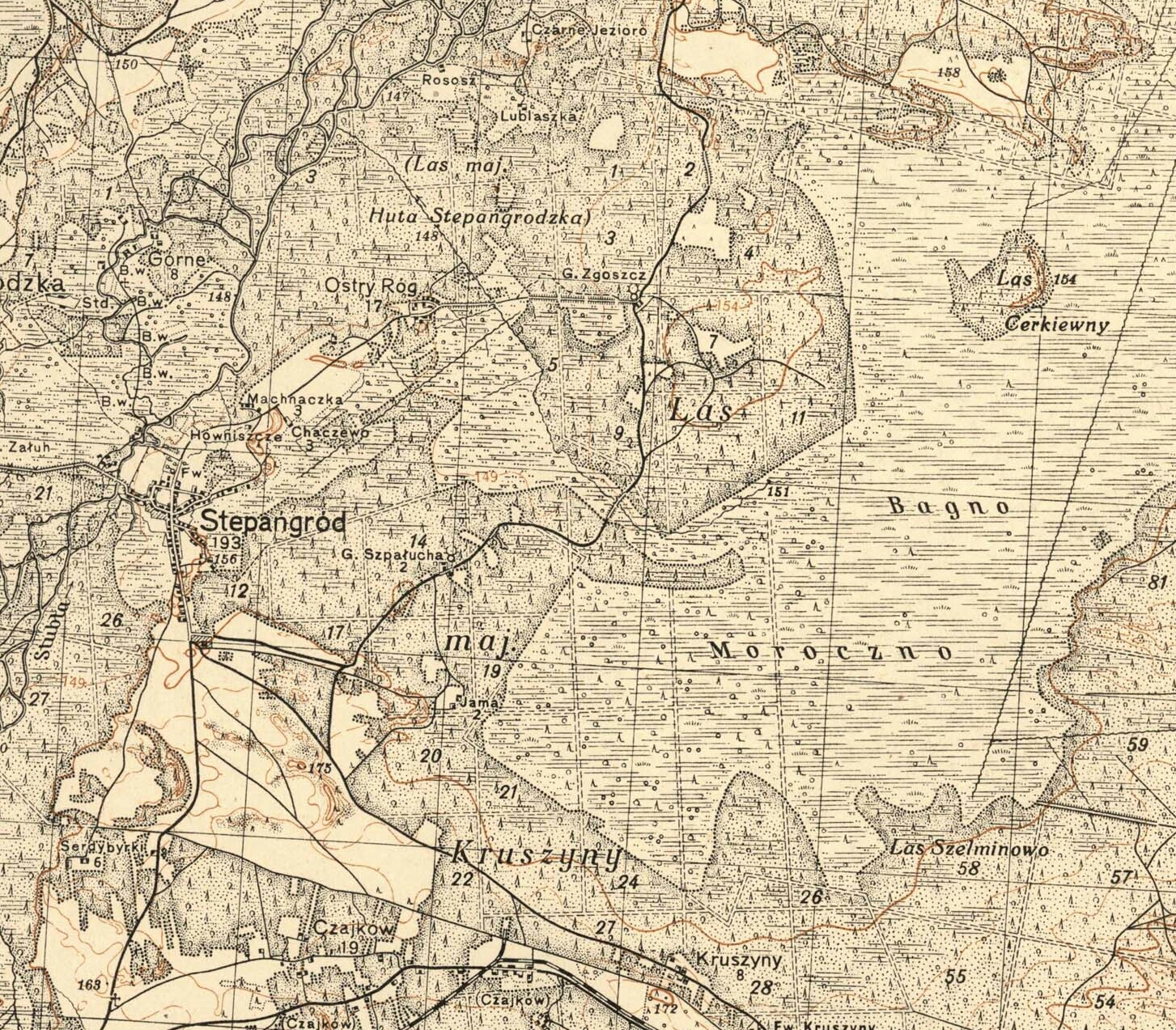 Крушинський ліс на карті